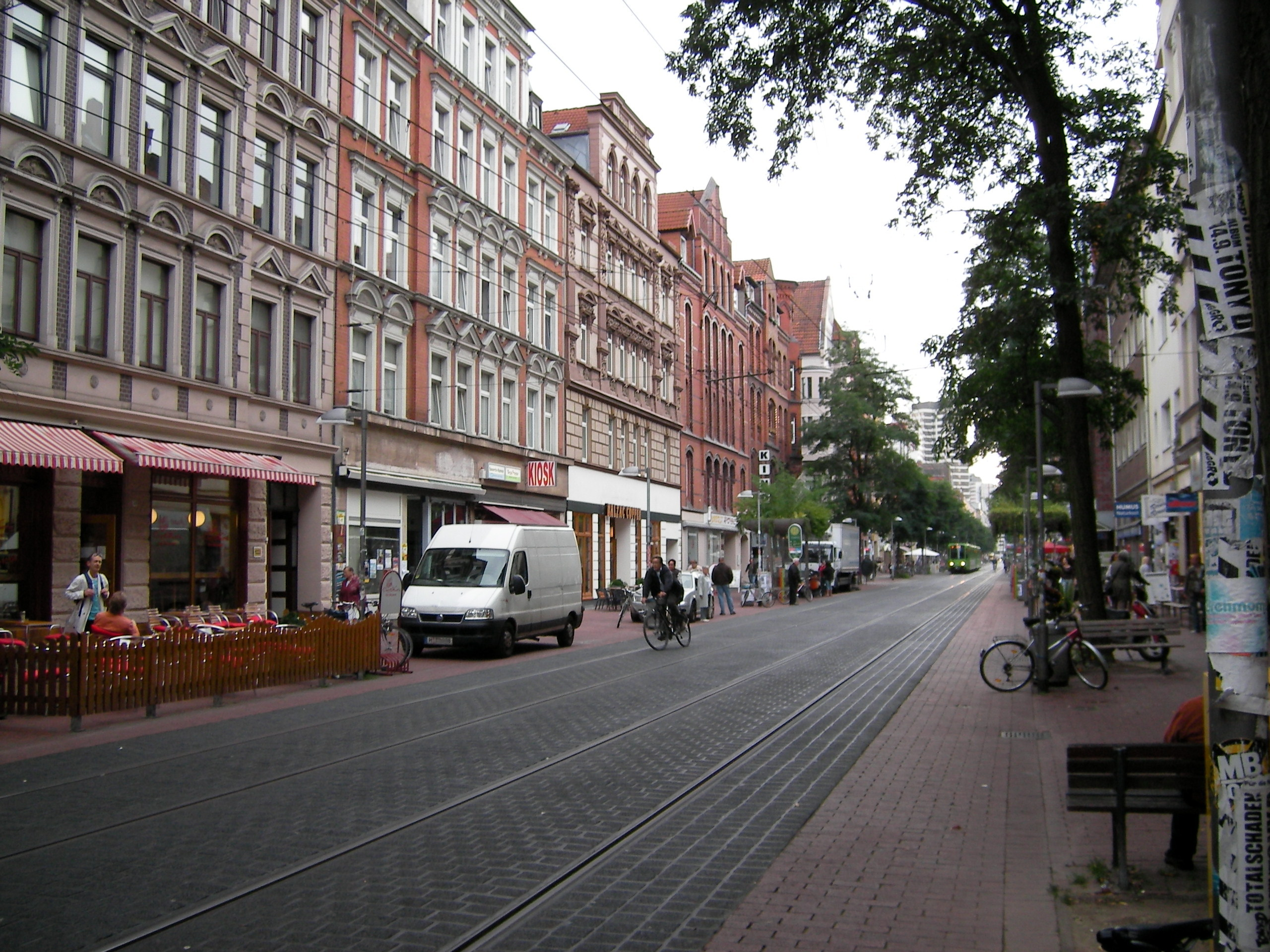 Limmerstraße in Hannover-Linden-Nord